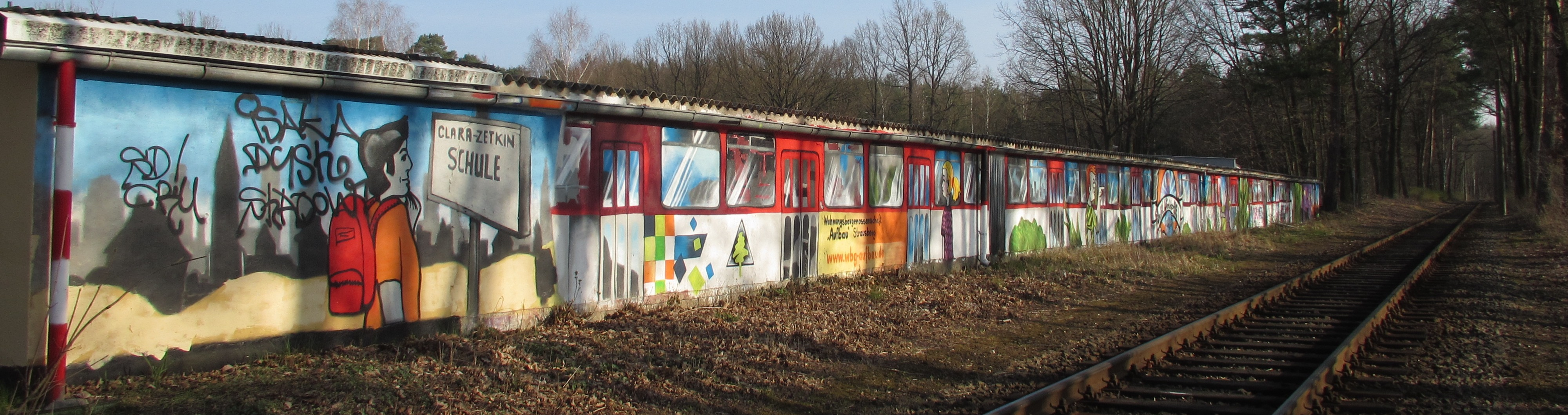 Gemeinschaftsprojekt "Garagen-Graffiti" der WBG "Aufbau" eG Strausberg und der Schule mit dem sonderpädagogischen Förderschwerpunkt Lernen "Clara Zetkin" Strausberg, das Projekt fand im Jahr 2012 statt